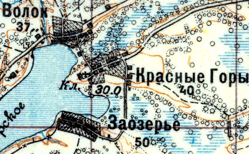 Топографическая карта Ленинградской области, квадрат VIc (Красные Горы), деревни Красные Горы и Заозерье